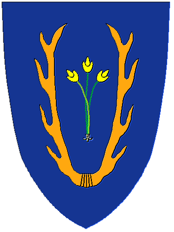 Stema „Scaunului Miercurea” (în germană Stuhl Reußmarkt sau Reußmarkter Stuhl), unitate administrativă a sașilor transilvăneni.